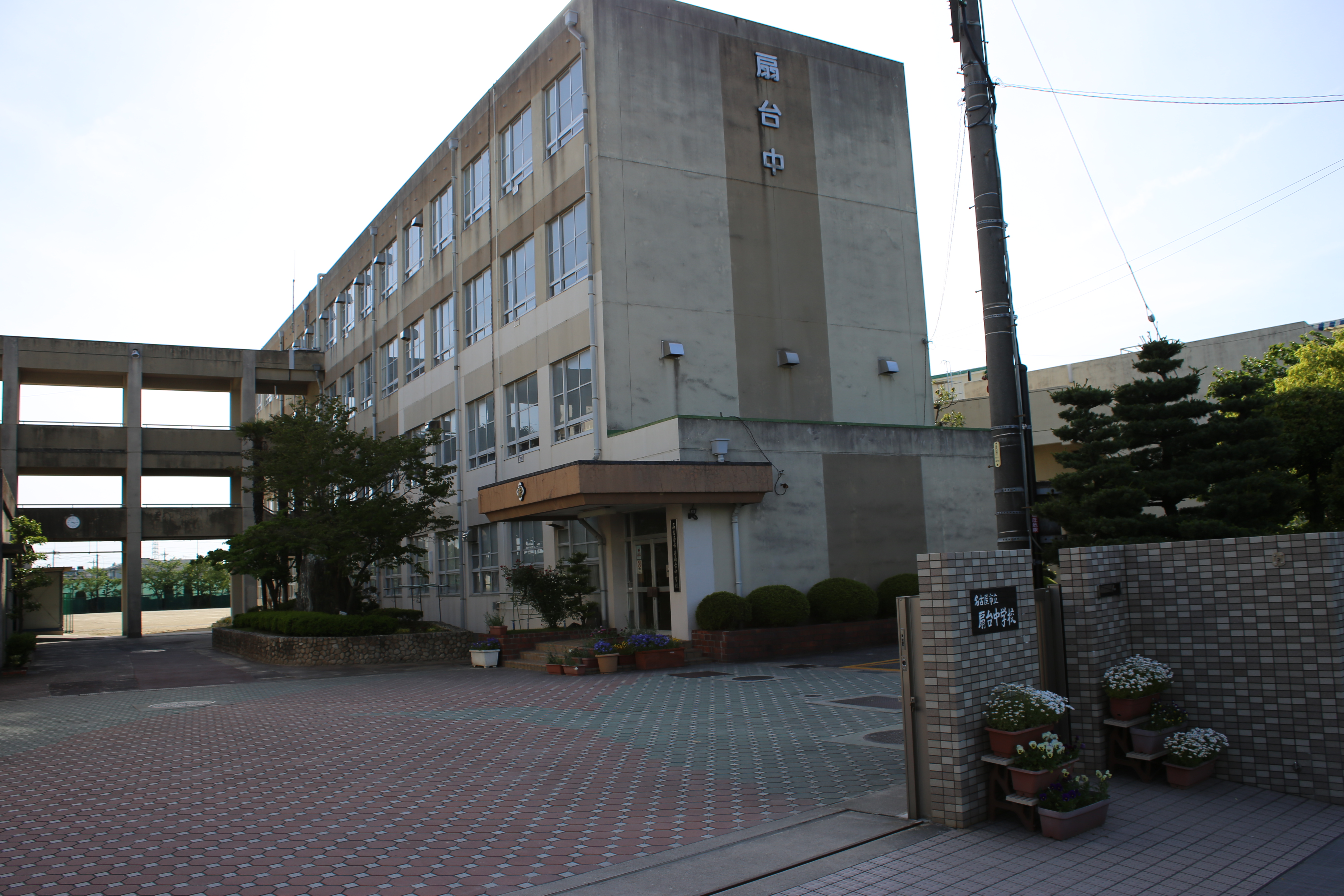 名古屋市緑区徳重一丁目の名古屋市立扇台中学校を東側公道南側より撮影